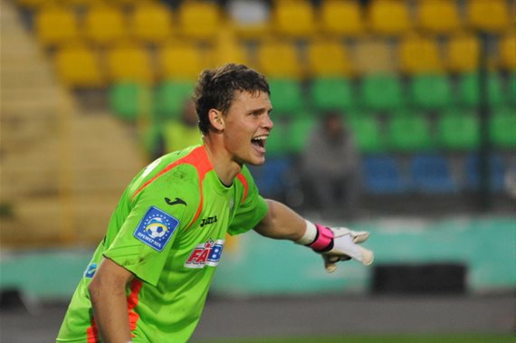 Олександр Ільющенков — український футболіст під час виступів за «Карпати» (Львів).